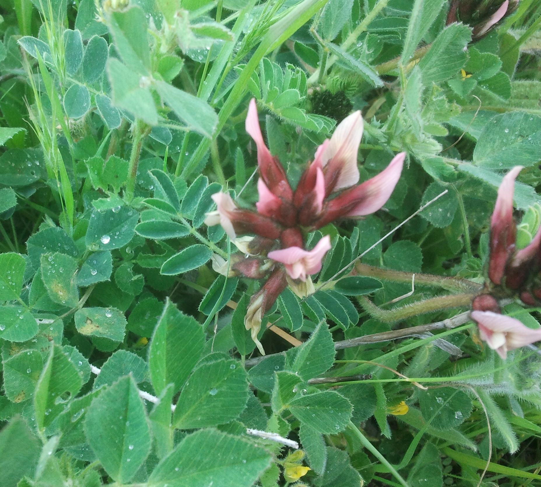 קדד בירותי שייך לתת-משפחת הפרפרניים, בנחל תות ברמות מנשה. סביבו עם פרחים צהובים אספסת מצויה. זוהה על ידי יעקב גרזון